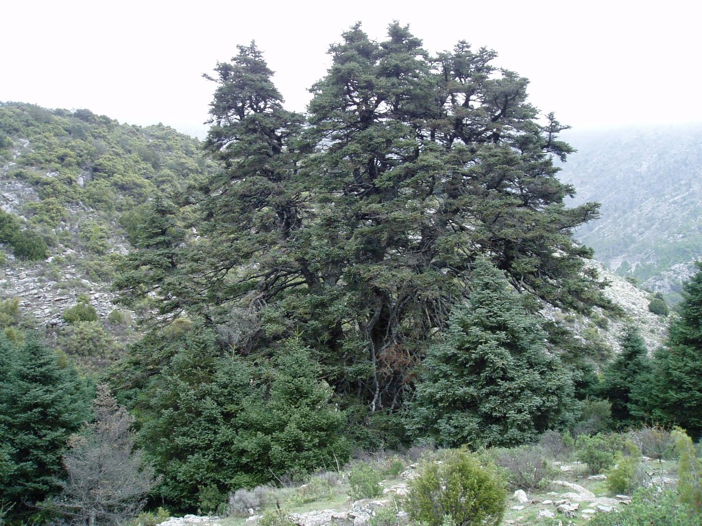 Abies pinsapo, large old specimen "Pinsapo de las Escaleretas". Sierra de las Nieves, Andalucía, España.